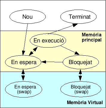 Diagrama d'estats d'un procés en un sistema operatiu amb un model de 7 estats.